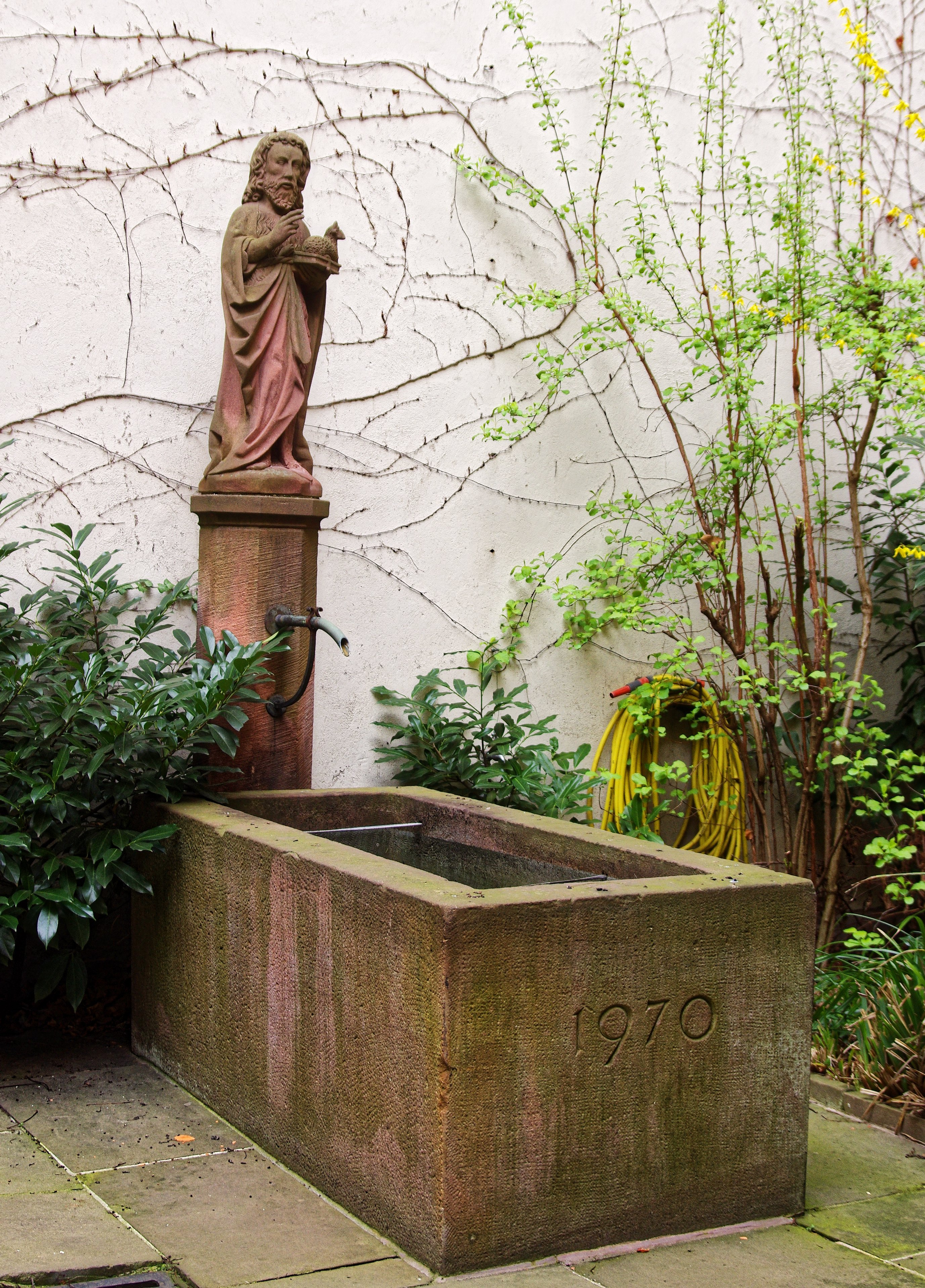 Stadtarchiv Freiburg: Brunnen im Innenhof